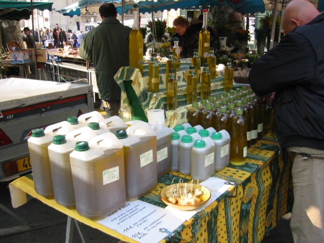 Huile d'olive 1